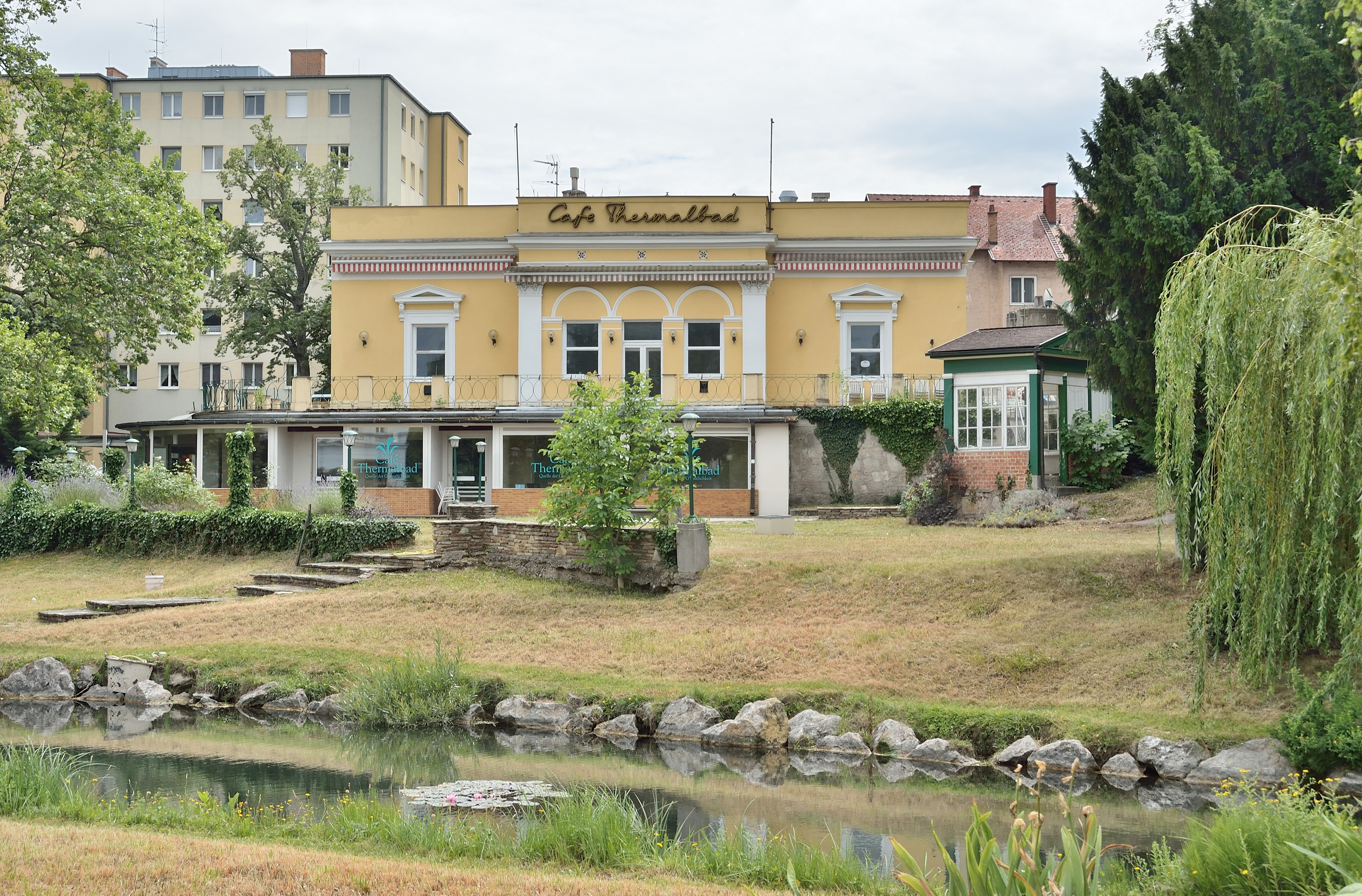 Villenanlage Pereira-Arnstein, Café Thermalbad, in Bad Vöslau wurde um 1830 erbaut und wird Joseph Kornhäusel zugeschrieben. Badner Straße 3.